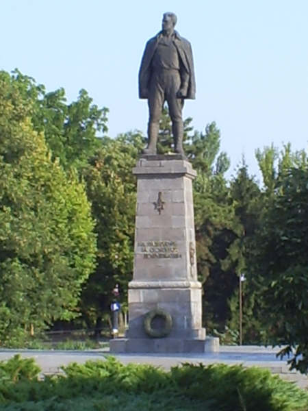 Паметник на Дочо Михайлов в Силистра